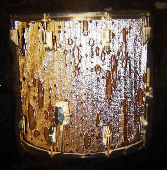 photo electroless nickel